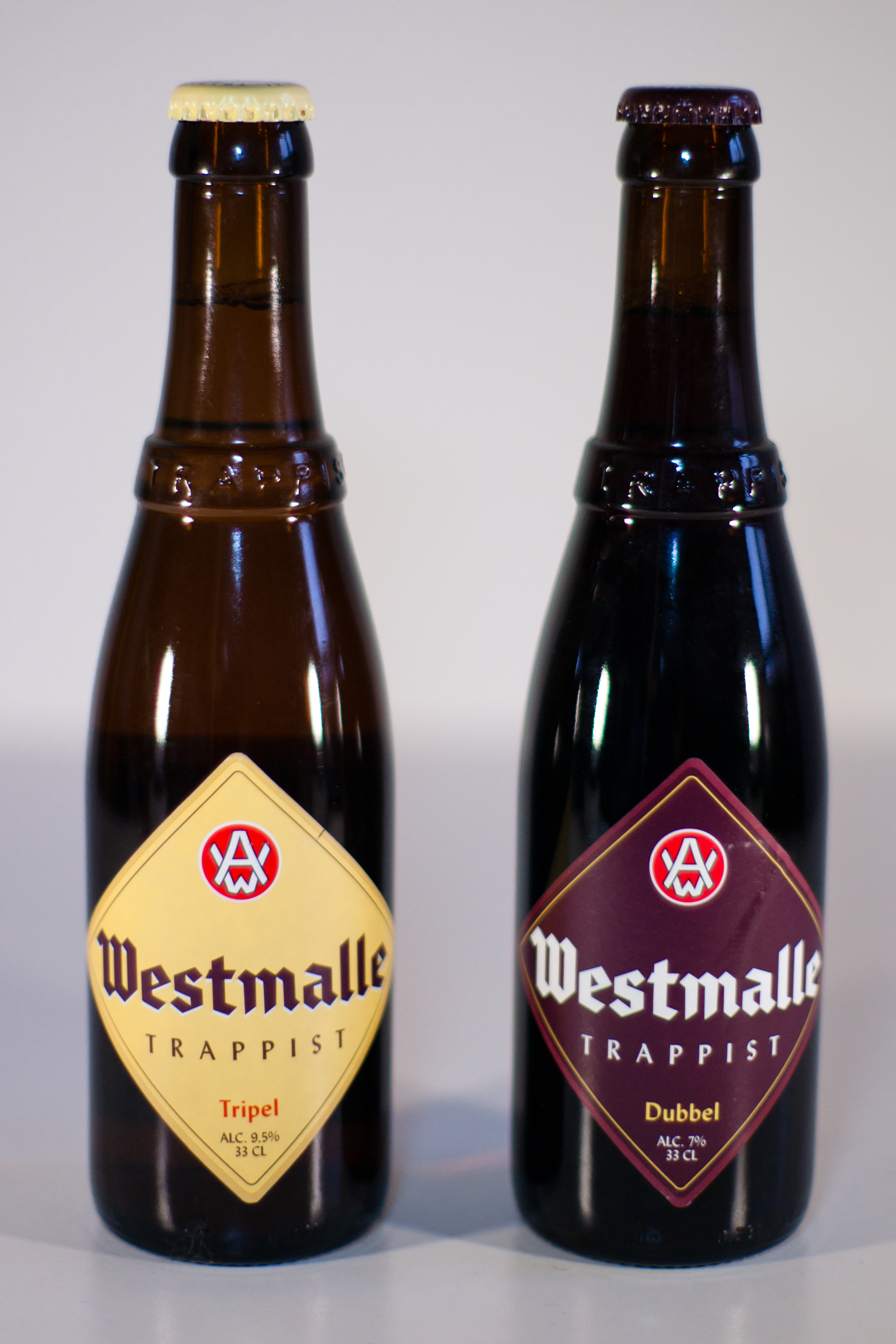 Westmalle, 2 bouteilles.